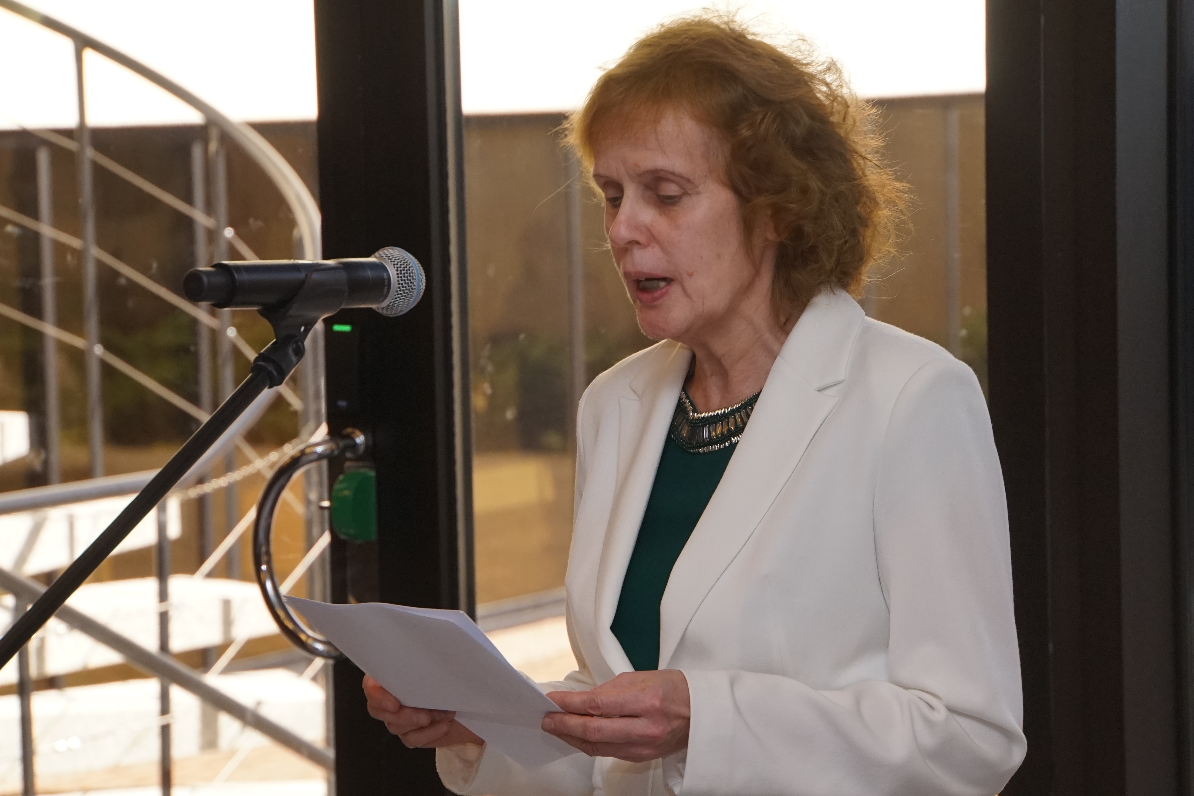 Läti välisministri visiit ja Eesti-Läti keeleauhinna üleandmine 12.05.2017